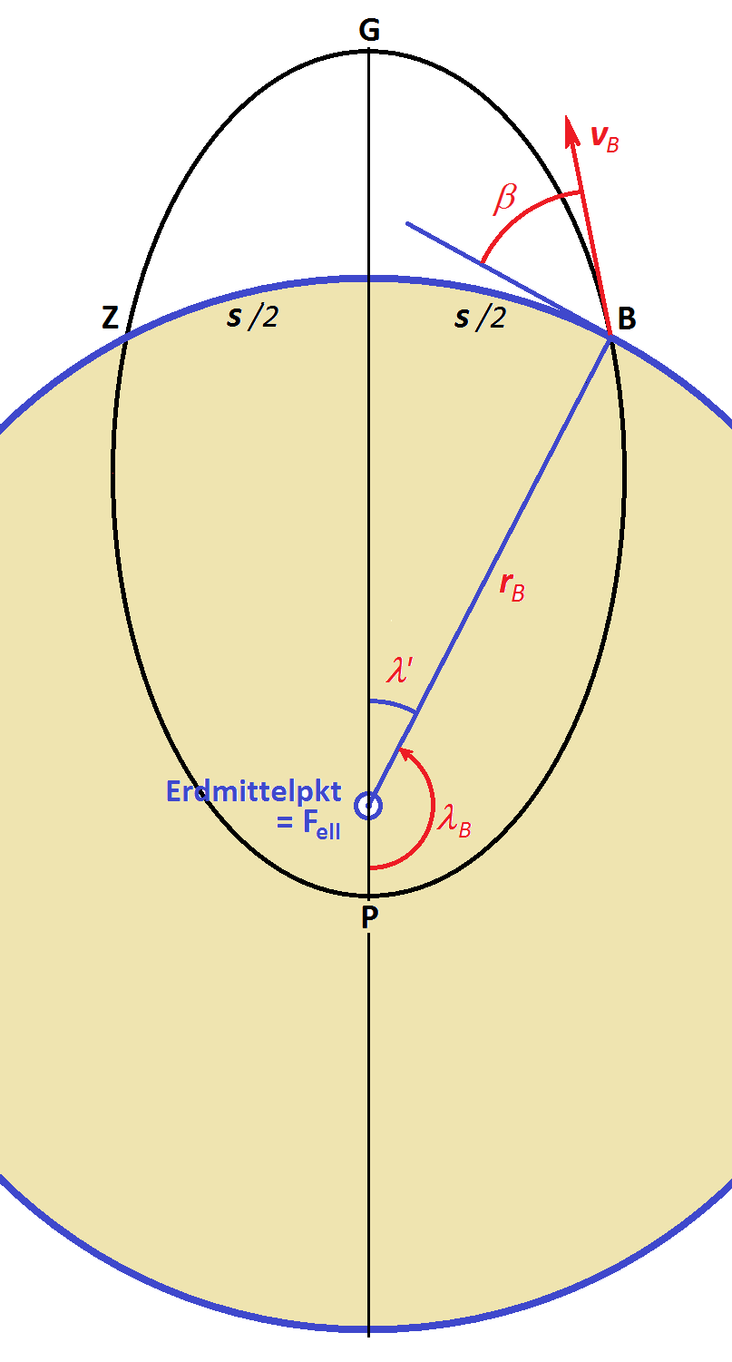 Interkontinentalrakete: geozentrische Ellipsenbahn B-G-Z ab Brennschluss (B), Abschusswinkel β, Zielpunkt Z